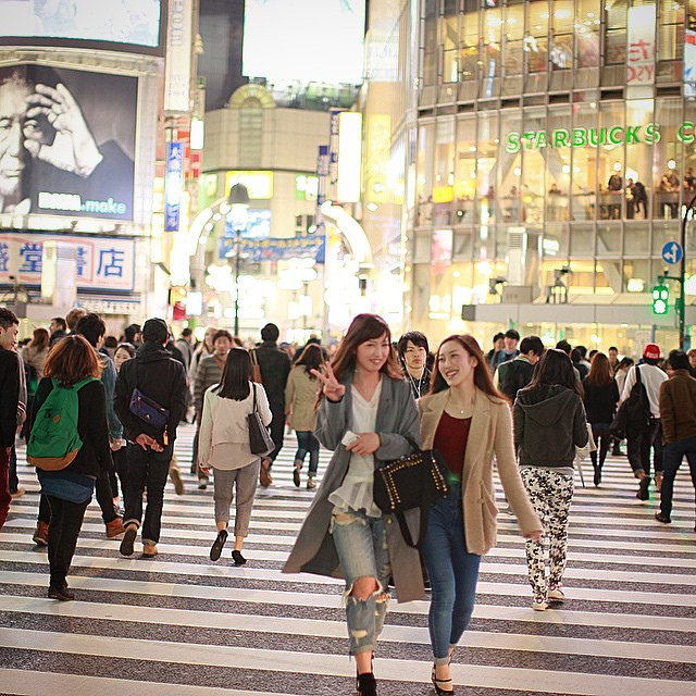 Shibuya girls posing at the crossing #shibuya #tokyo #japan #渋谷 #東京 #日本